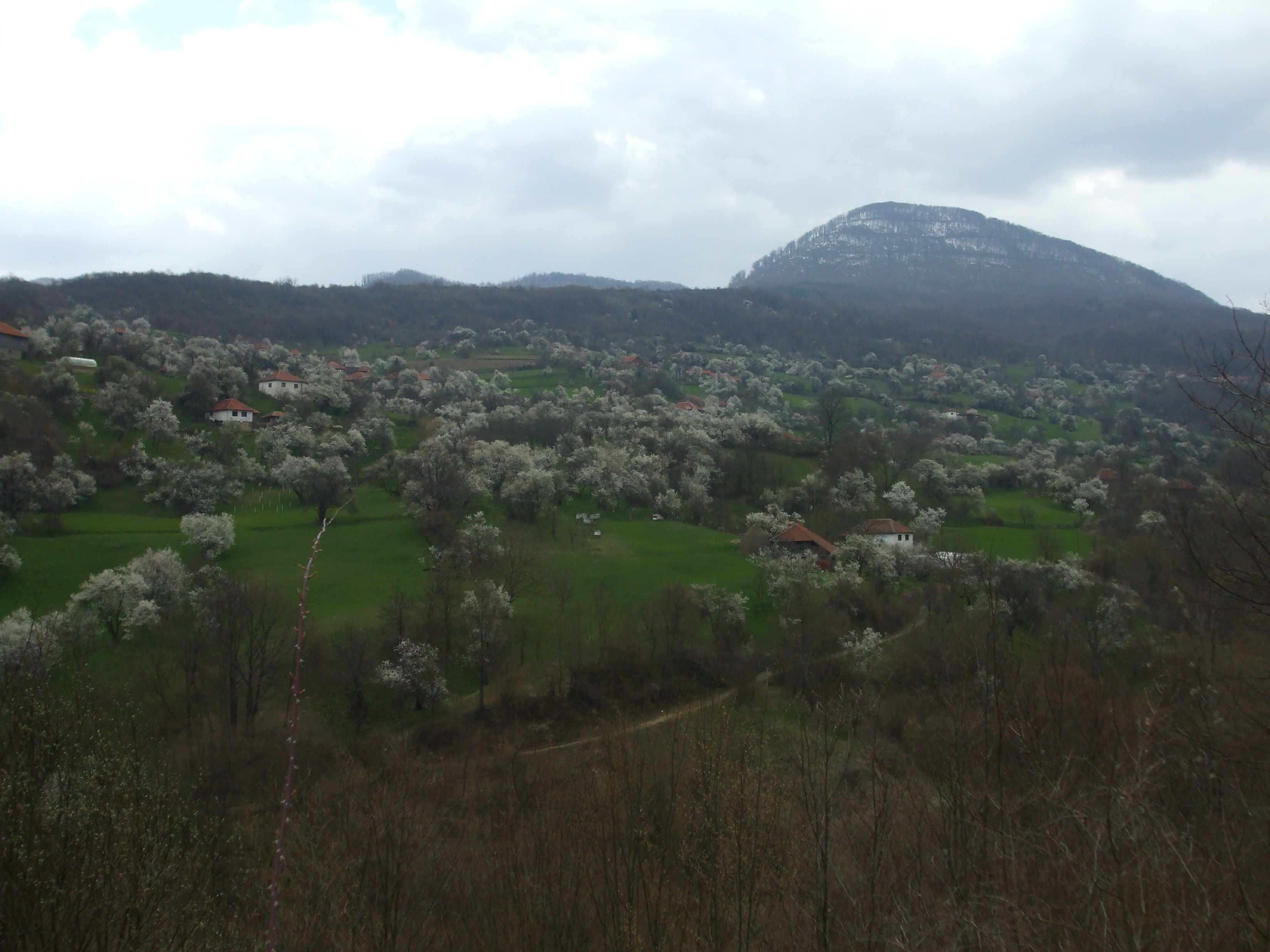 Дреновац, Горња махала, поглед са пута Врање - Пољаница. Снимио Драгољуб. У позадини се виде обронци врха Грот.